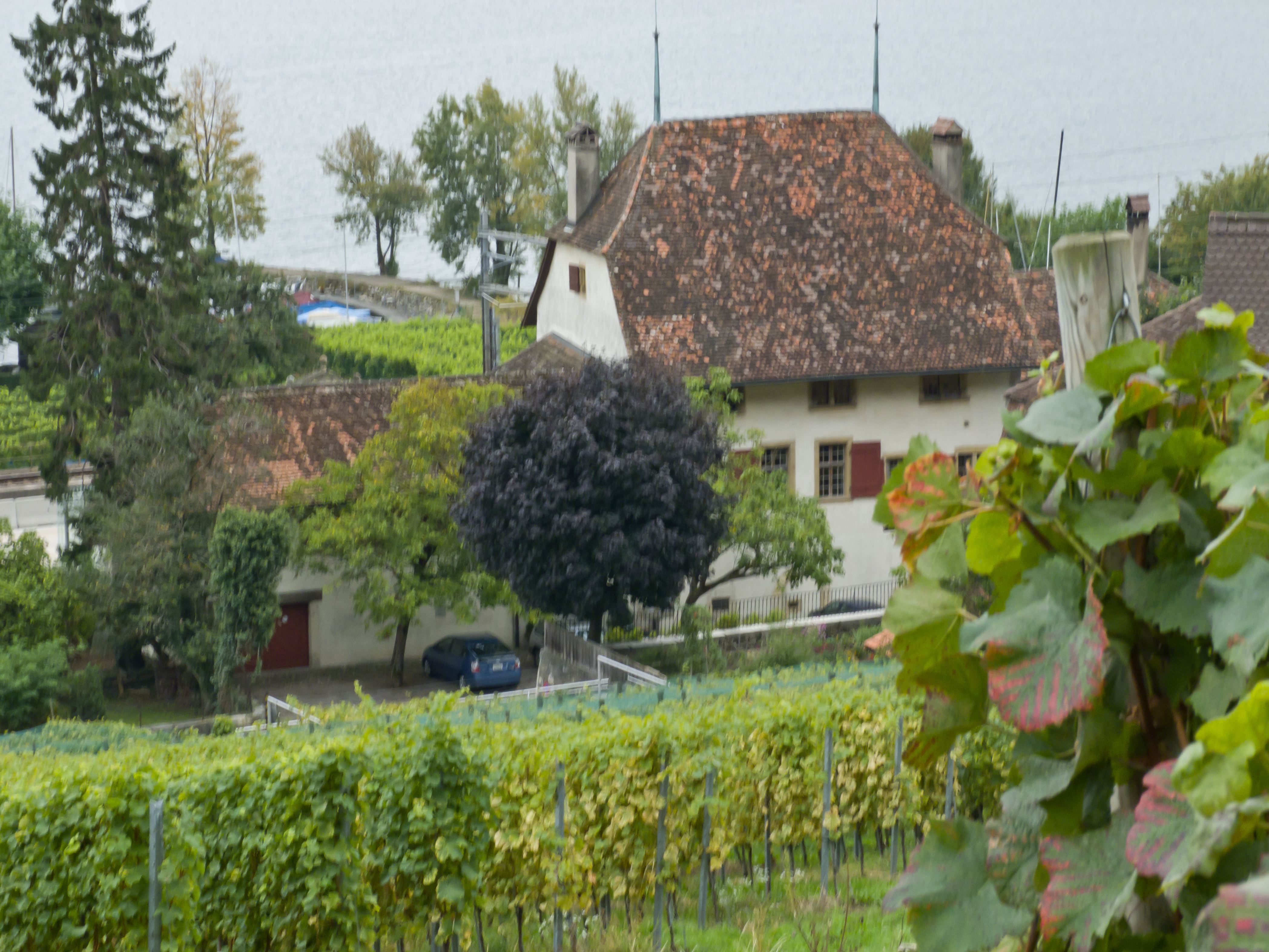 Ehem. Thormanngut, heute Rebhaus der Winzer